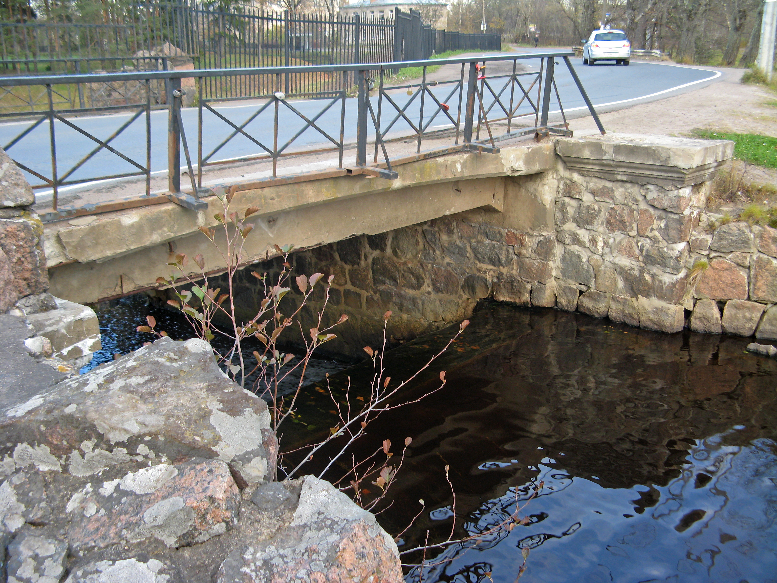 Государственный художественно-архитектурный дворцово-парковый музей-заповедник 'Ораниенбаум': между Краснофлотским шоссе, Иликовским проспектом, Ямбургской/Новой дорогой и Ореховой аллеей, Ломоносов, Петродворцовый район, Санкт-Петербург